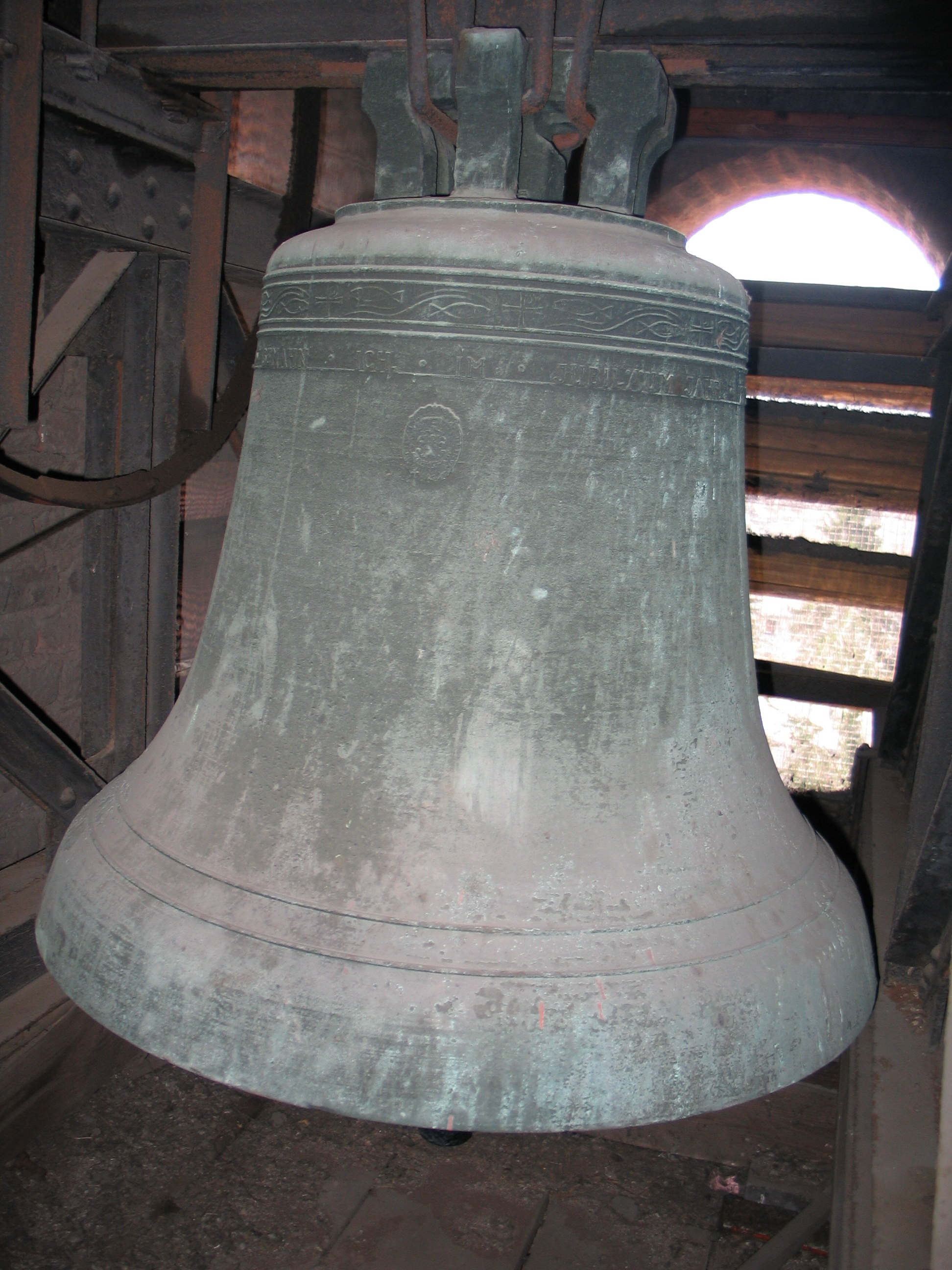 Glocke 2 von St. Remigius in Köln-Sürth